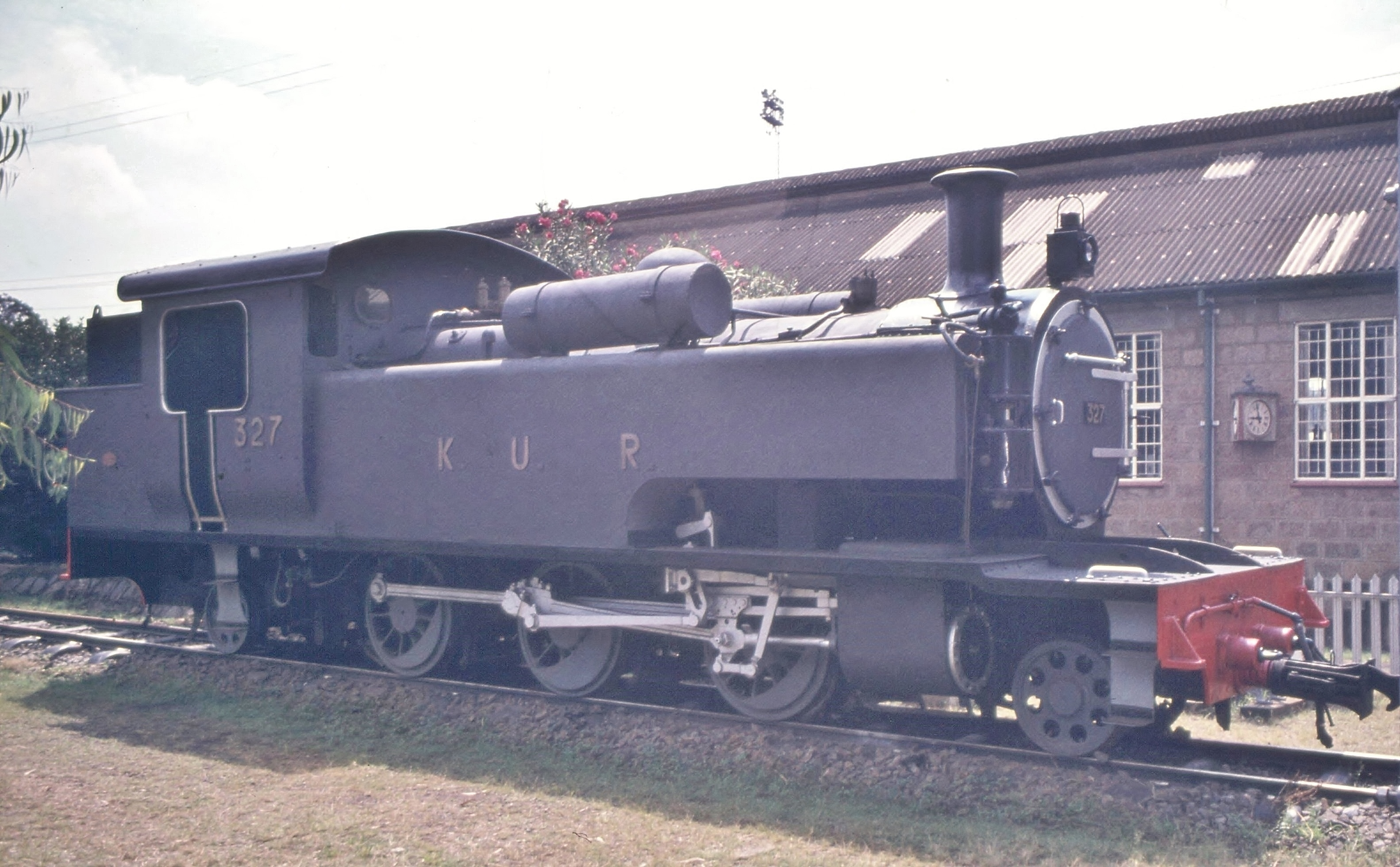 Train01 Nairobi Kenya